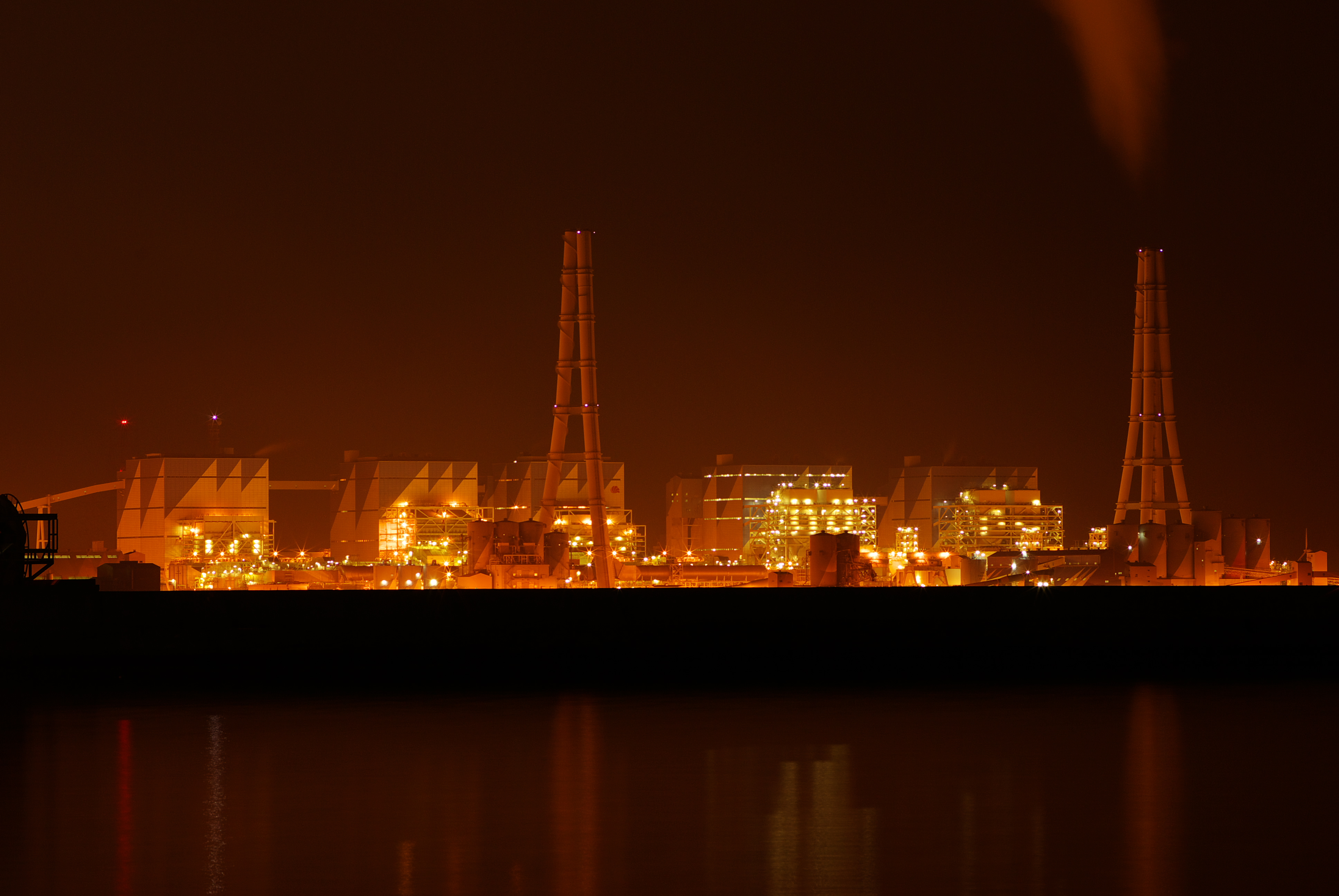 夜の碧南火力発電所。武豊町1号地より撮影。